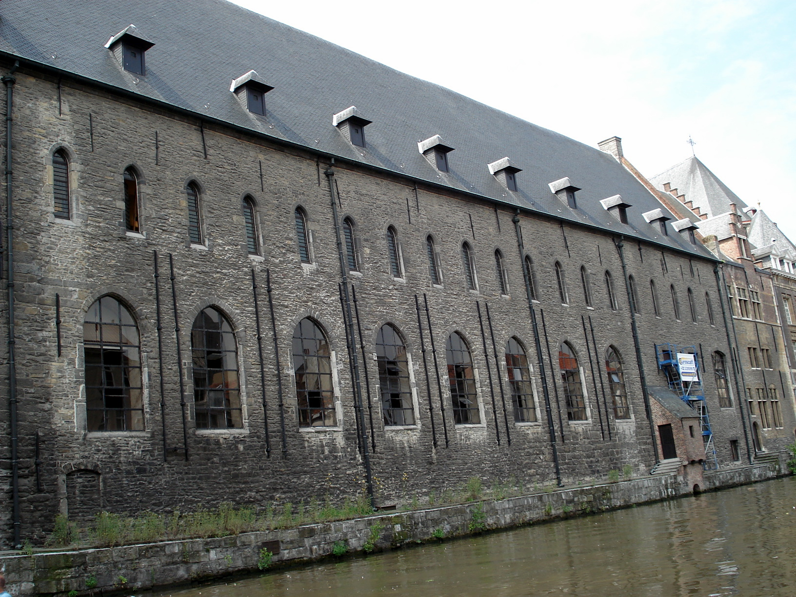 Het Pand der Dominicanen (of der predikheren) te Gent.